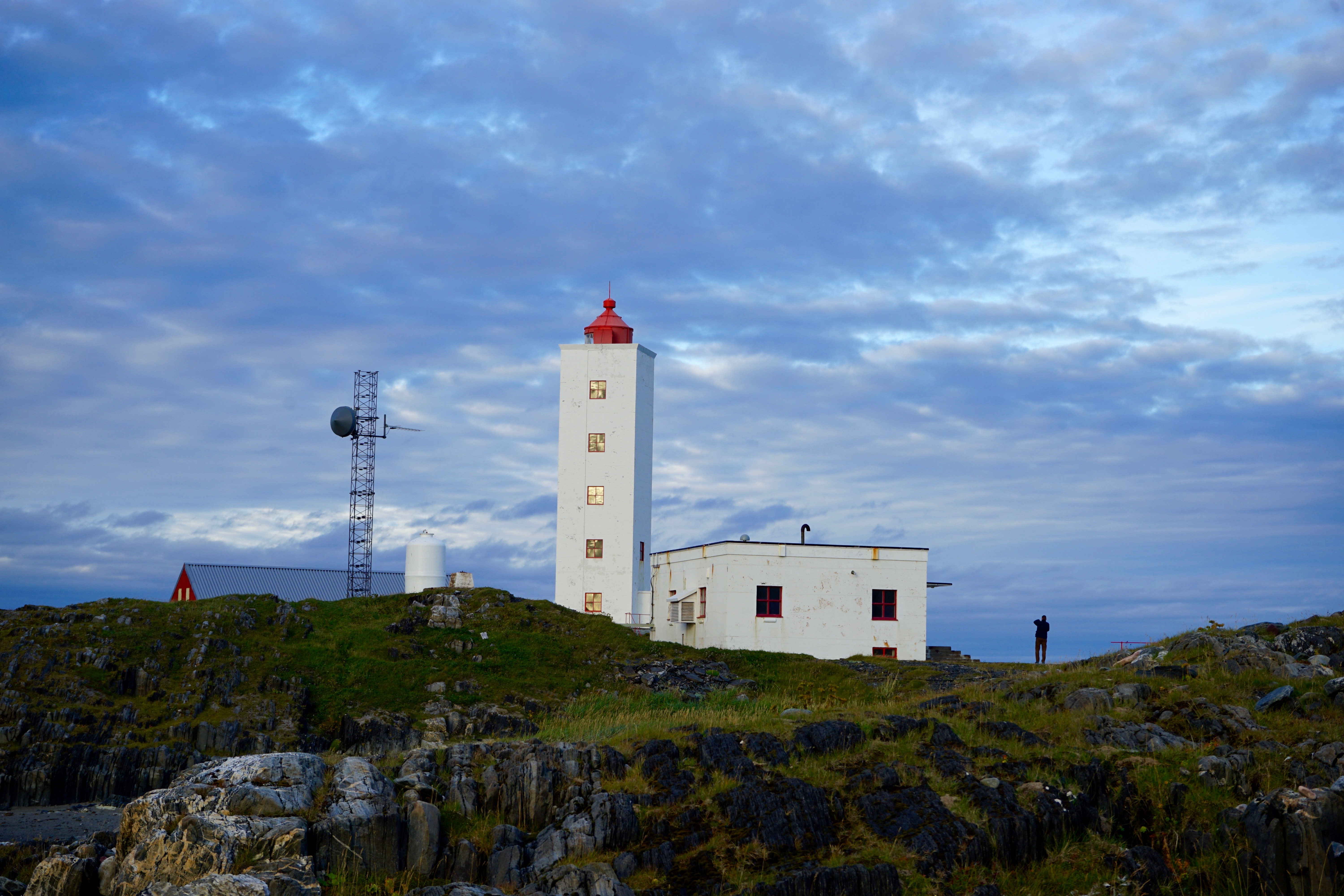 Kjølnes fyr - Bilde av Christer Gundersen